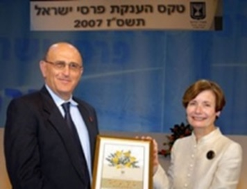 ארנון מנטבר מקבל בשם ארגון גוינט ישראל את פרס ישראל 2007.